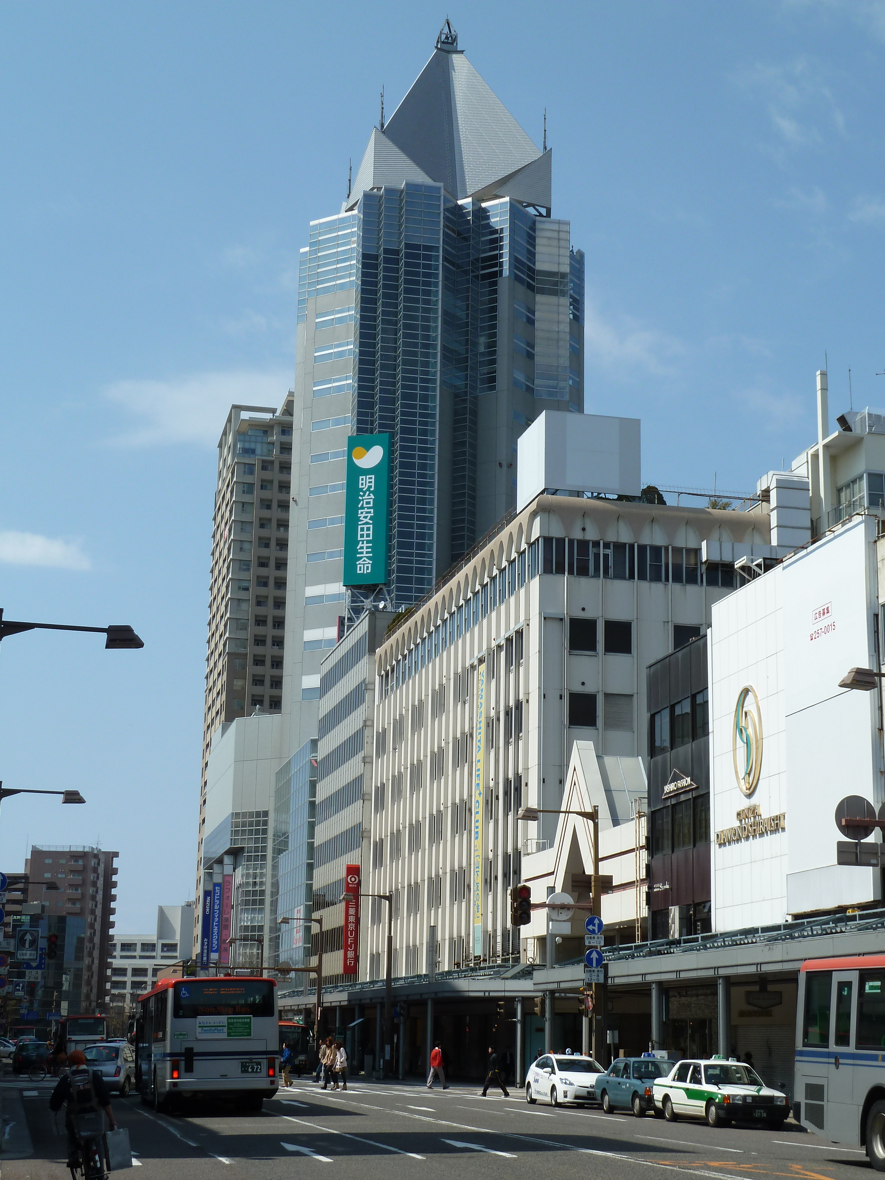 Next21遠景